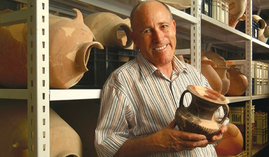 הארכאולוג פרופסור עמוס קלונר